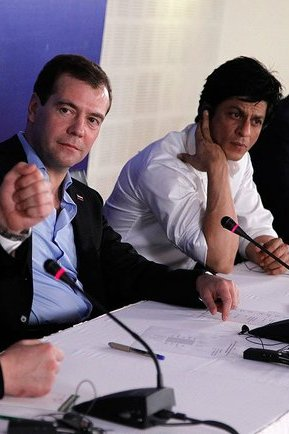 На киностудии в Болливуде. Встреча с российскими и индийскими кинематографистами.